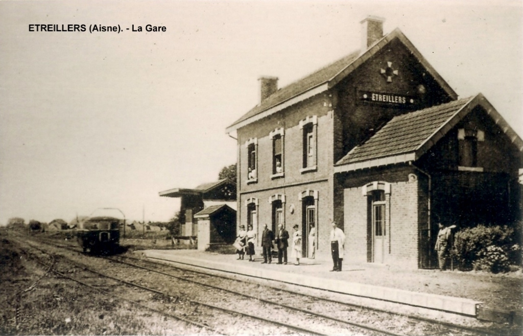 La gare d'Etreillers vers 1950.